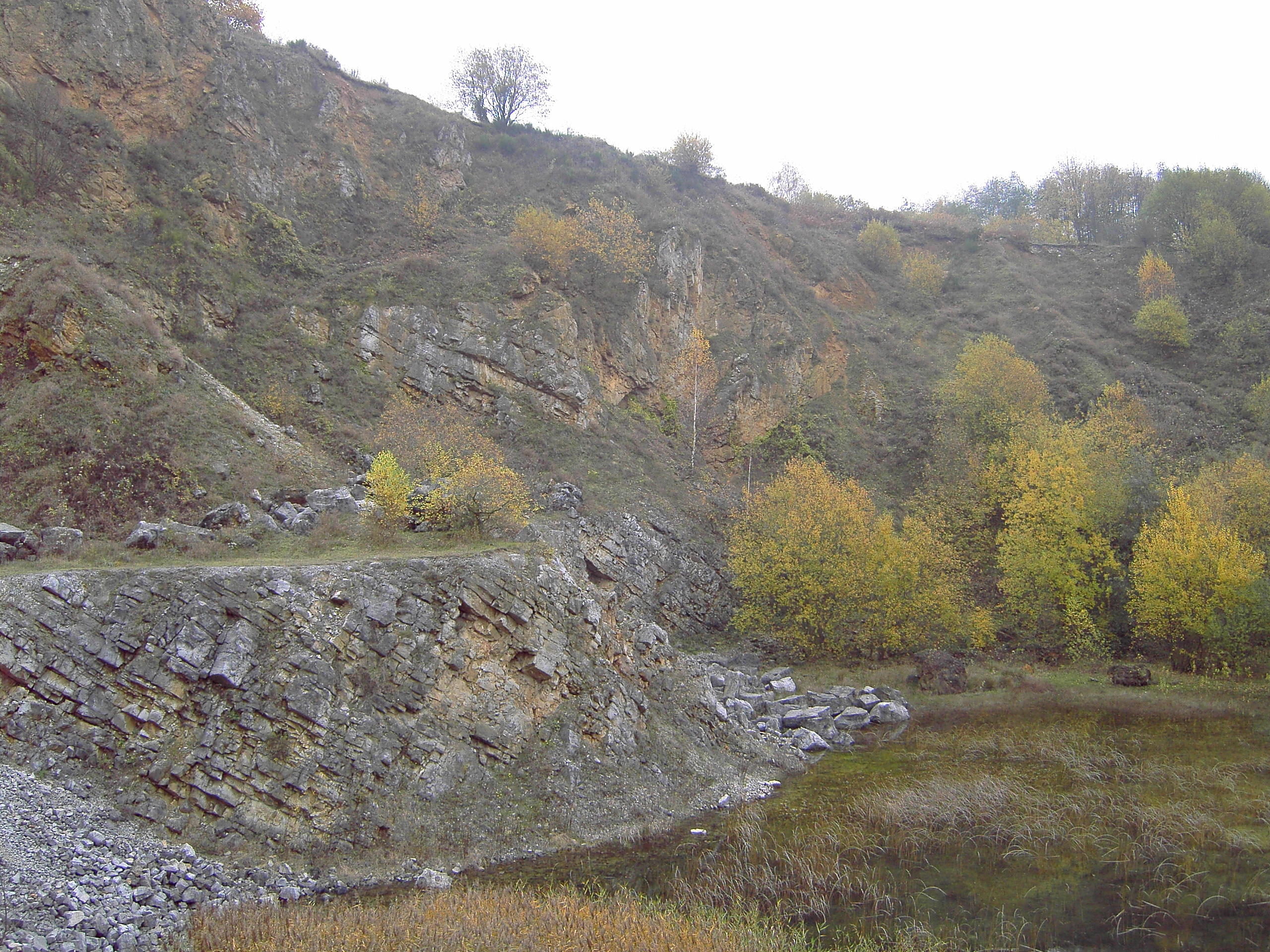 Impressionen aus dem Steinbruch